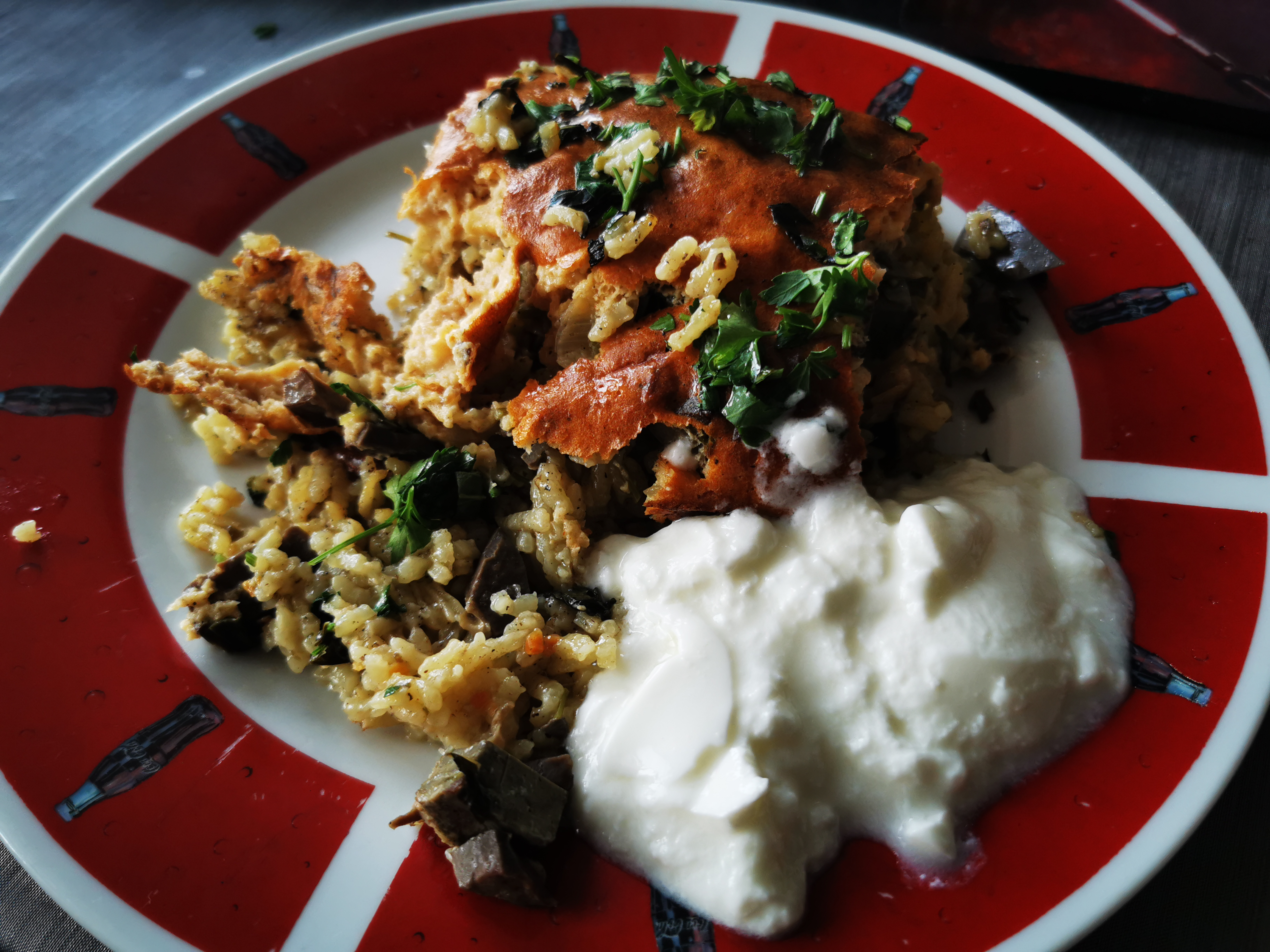 Дроб сарма- традиционно ястие, разпространено широко на Балканския полуостров.